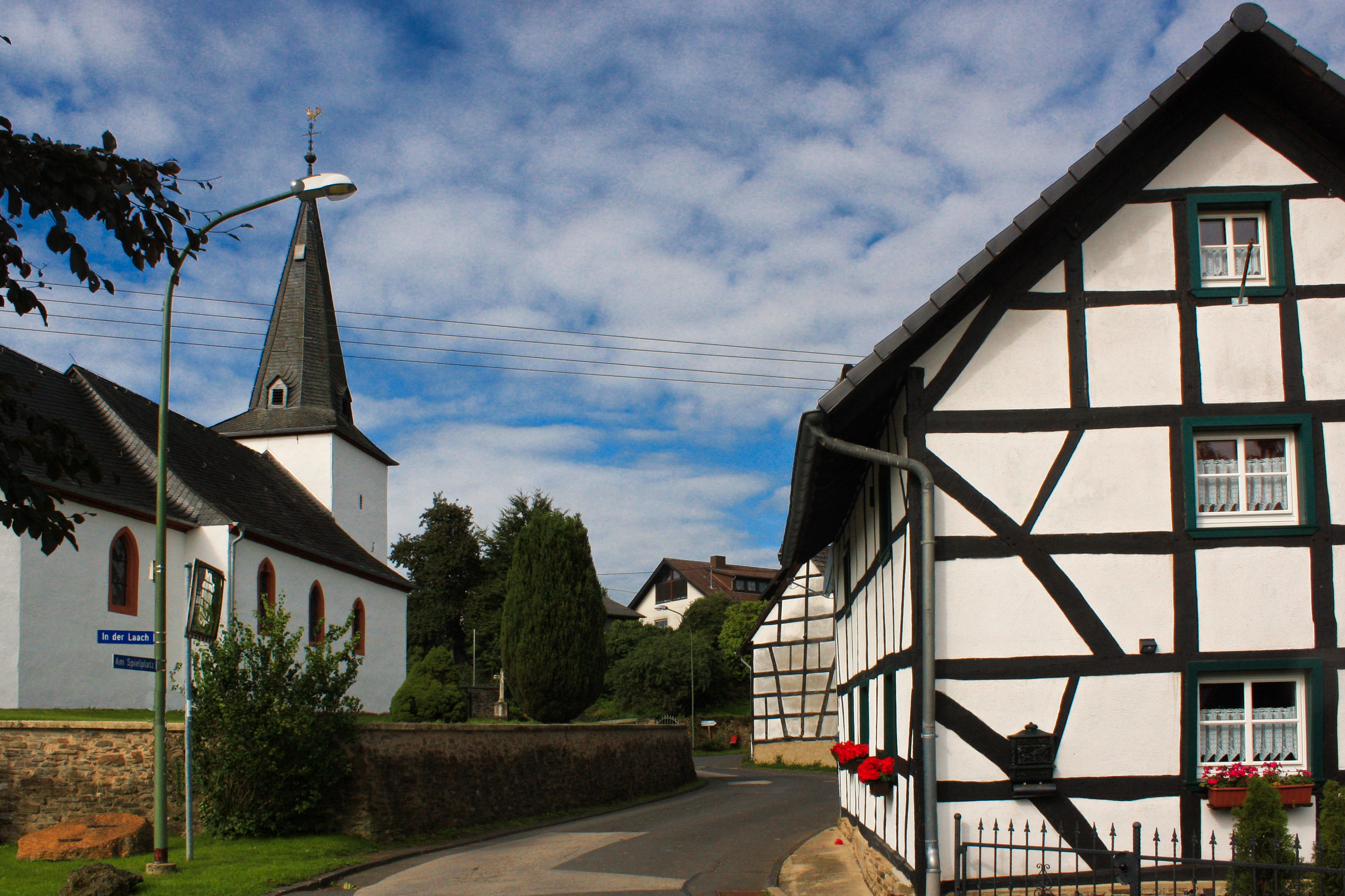 Reetz